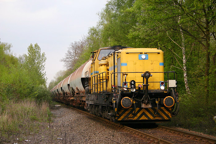 477 mit leeren Braunkohlestaub-Wagen auf dem Weg von Frechen nach Fortuna-Nord (Bergheim-Niederaussem).